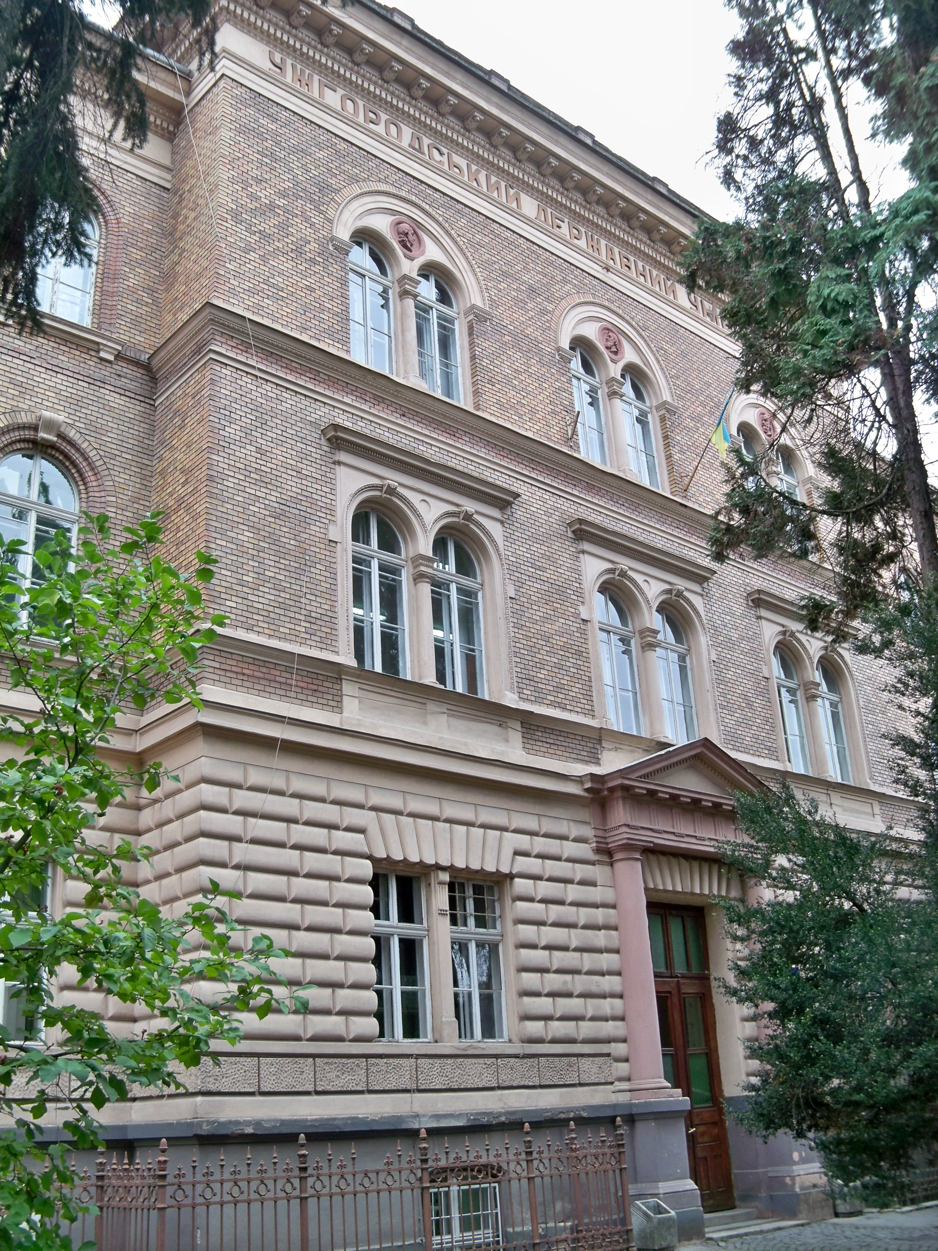 Будинок хімічного факультету УжНУ, в якому був відкритий перший Закарпатський університет (мур.), Ужгород, вул. О. Фединця, 53